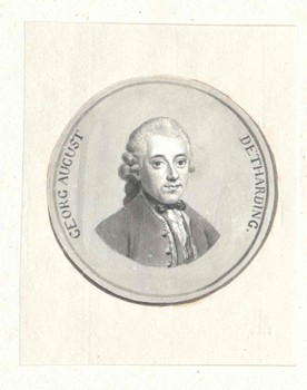 Porträt des Georg August Detharding (1717-1786), Domherr in Lübeck.